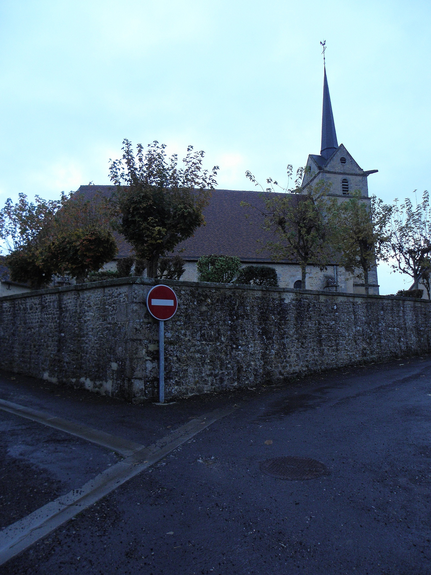 Église Saint-Aubin de Saint-Aubin-d'Appenai (61).